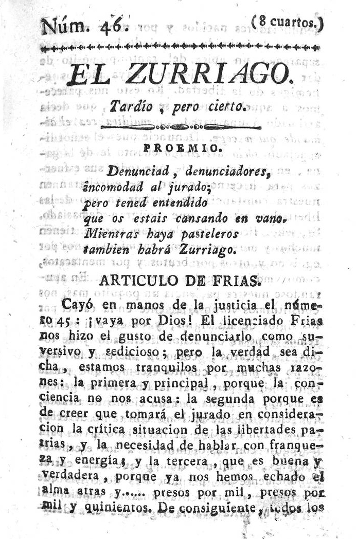 Primera página del número 46 del periódico satírico español El Zurriago.